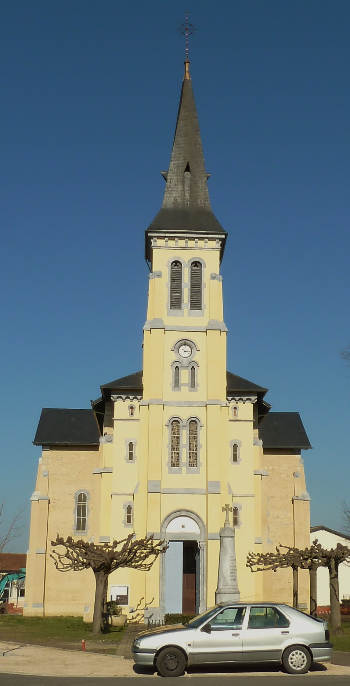 Église de Labastide-Cézéracq